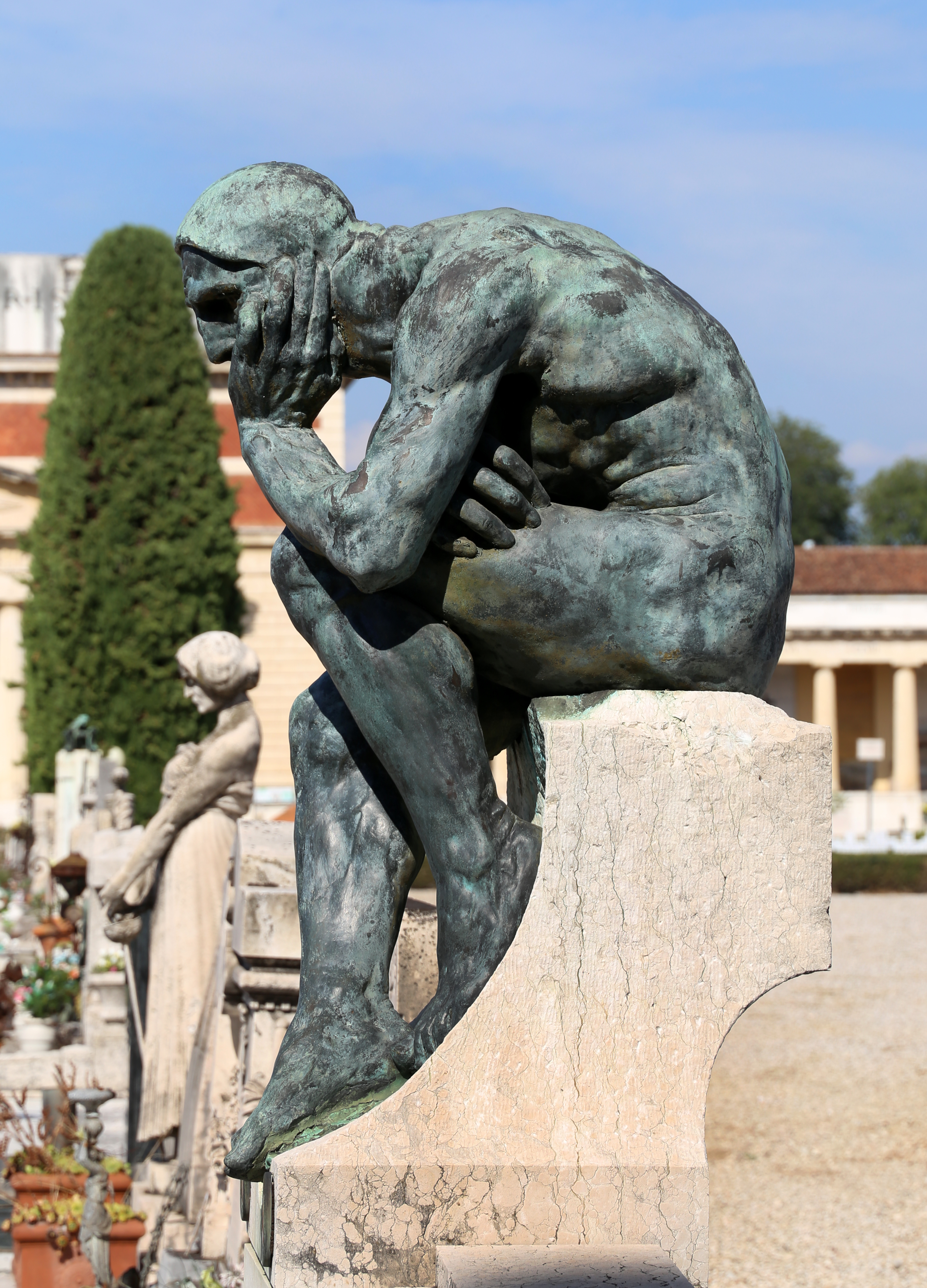 cimitero monumentale di Verona This is a photo of a monument which is part of cultural heritage of Italy.